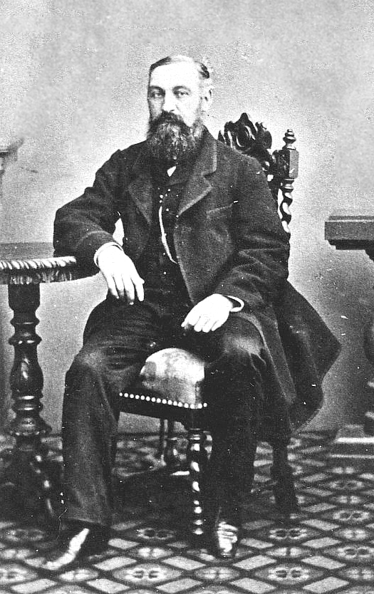 Colonel Władysław Kononowicz